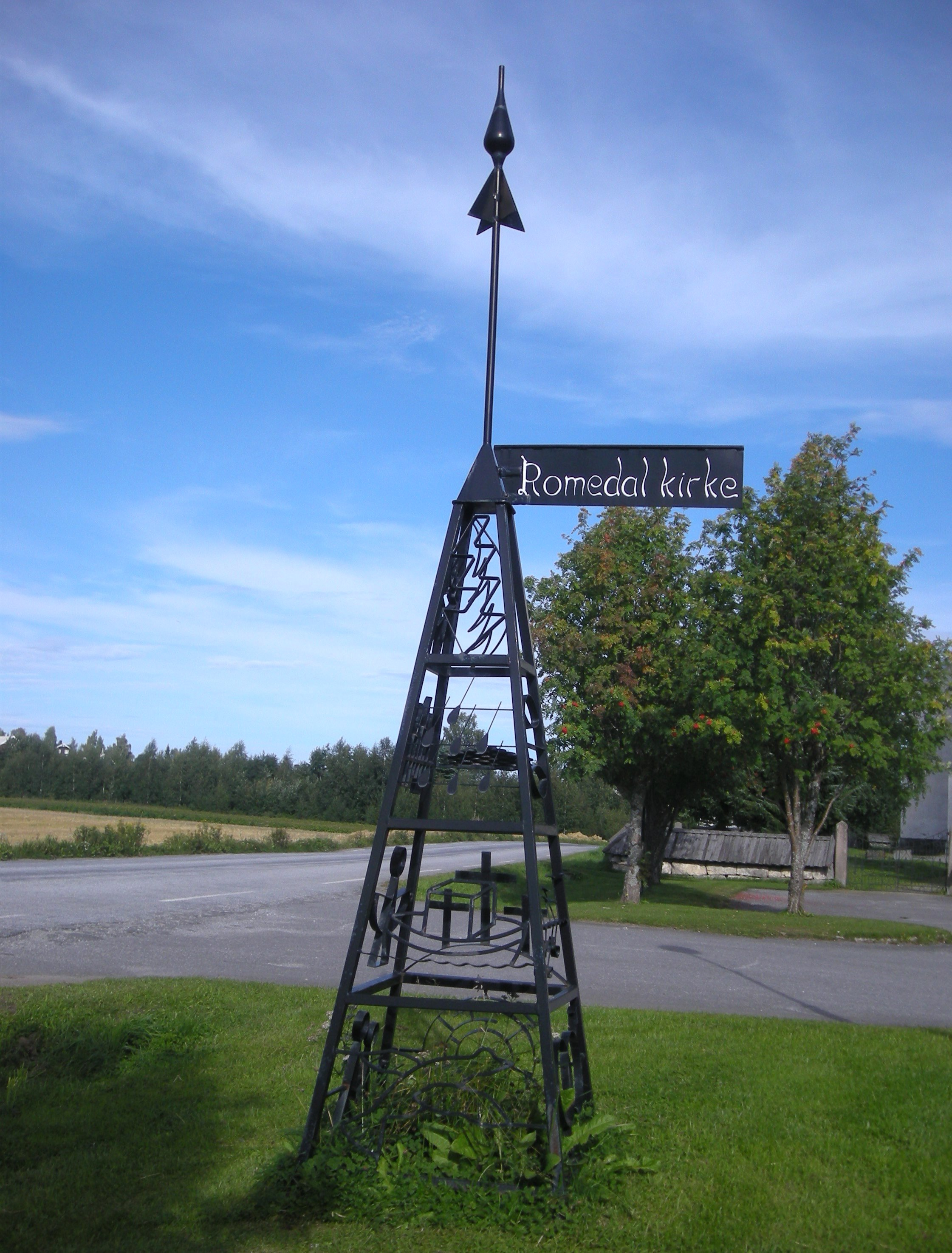 Fylkesvei 195 ved Romedal kirke (Stange kommune, Hedmark)